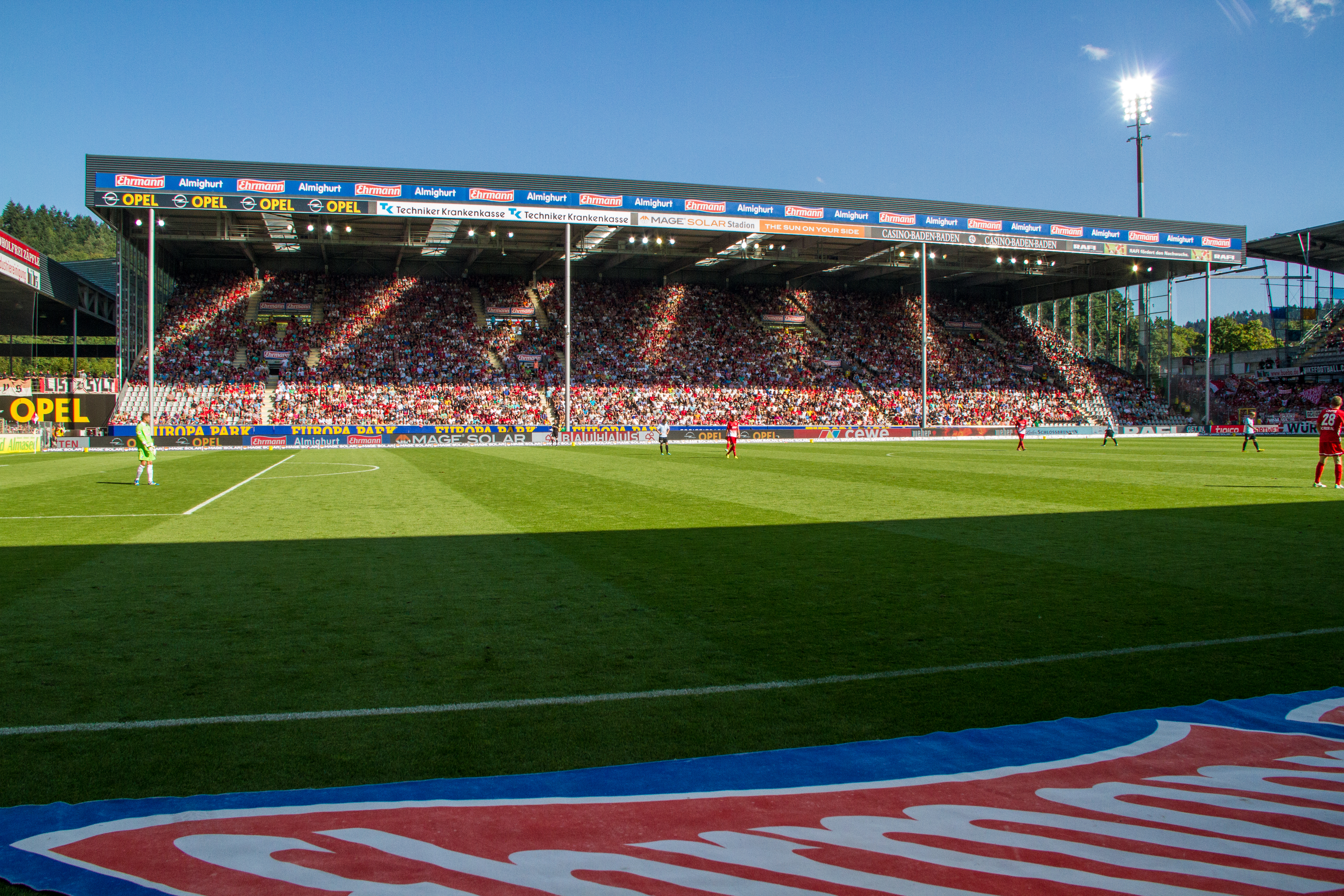 SC Freiburg vs FSVMainz 17 août 2013